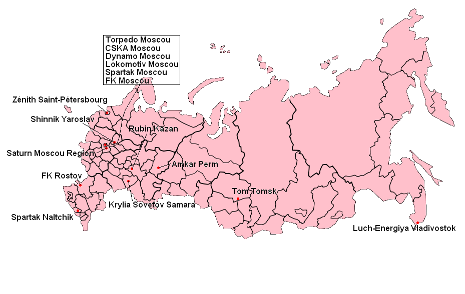 Participants à la Premier League 2006.